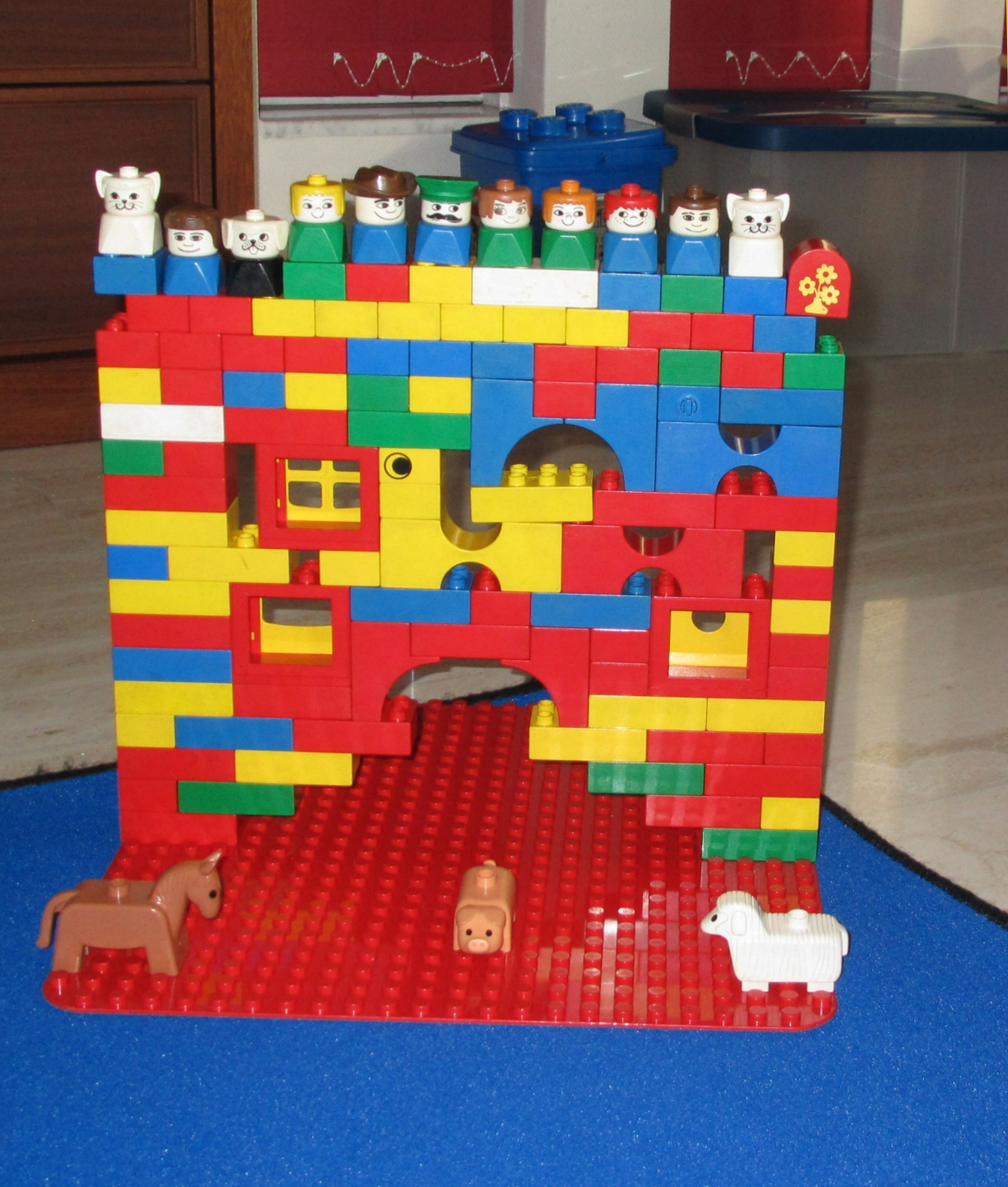 Duplo bouwwerk gemaakt in 2012